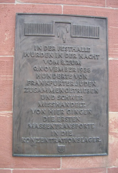 Mahntafel der nationalsozialistischen Vergangenheit der Festhalle in Frankfurt am Main.